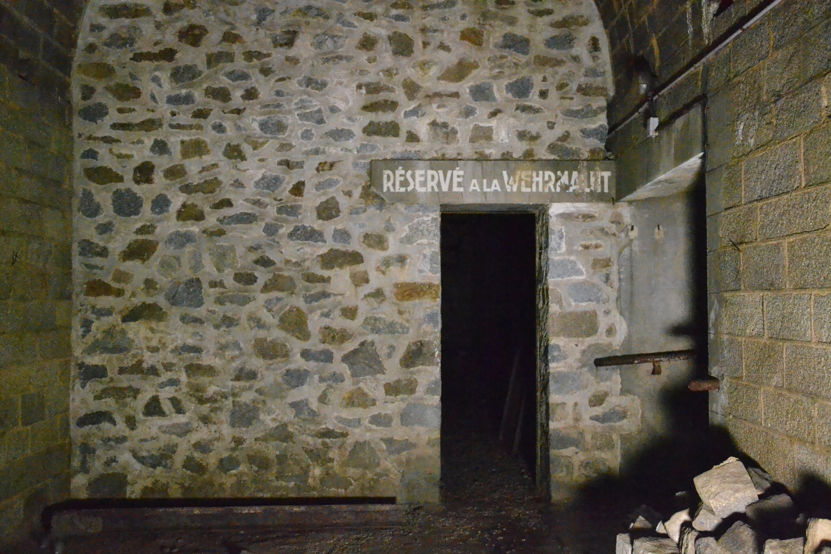 Entrée de l'ancien abri réservé à la Wehrmacht, dans l'ancienne rue souterraine de la gare de Limoges-Bénédictins.